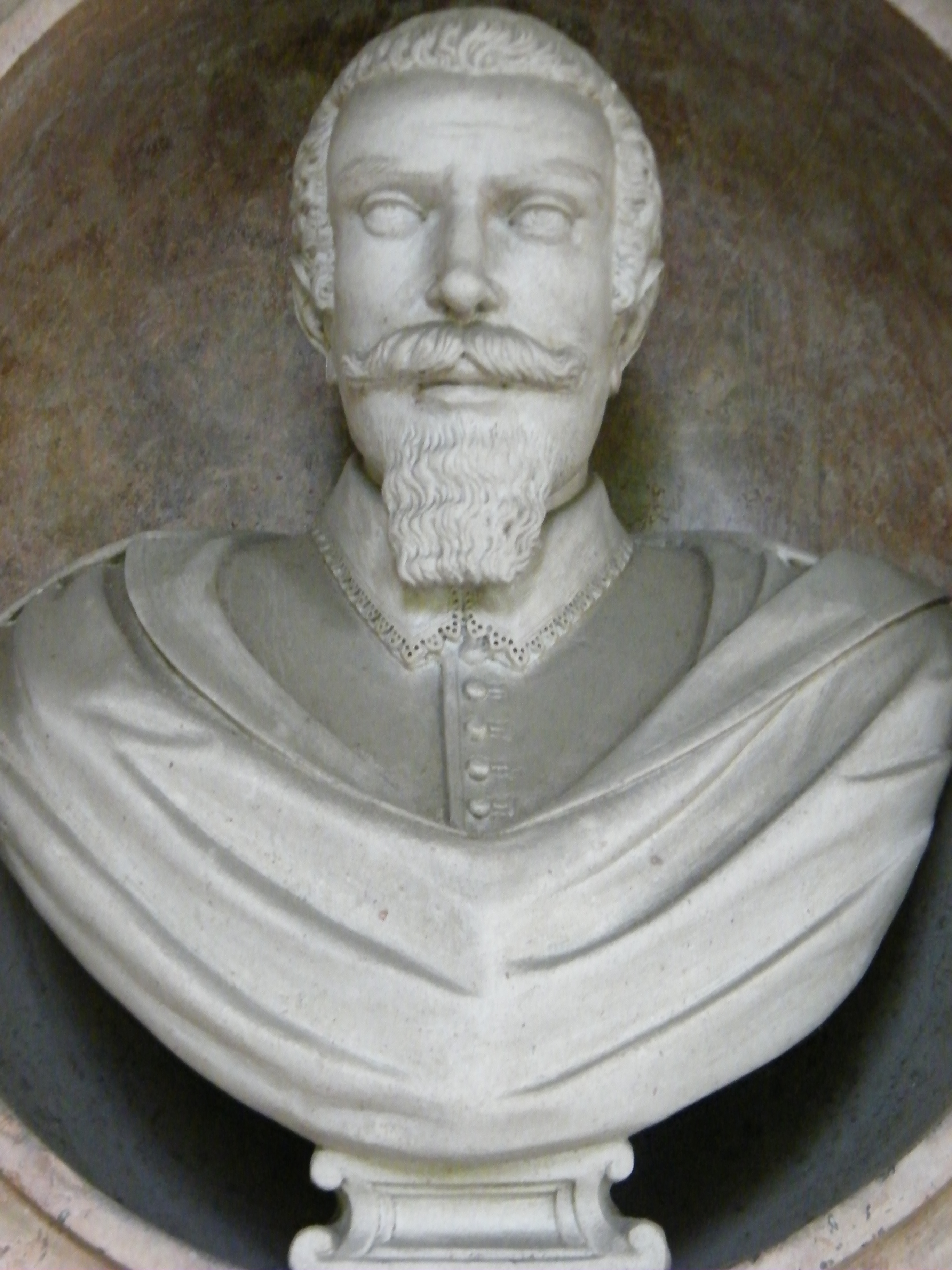 Büste Elias Catellos am Grabmal im Sebastiansfriedhof Salzburg